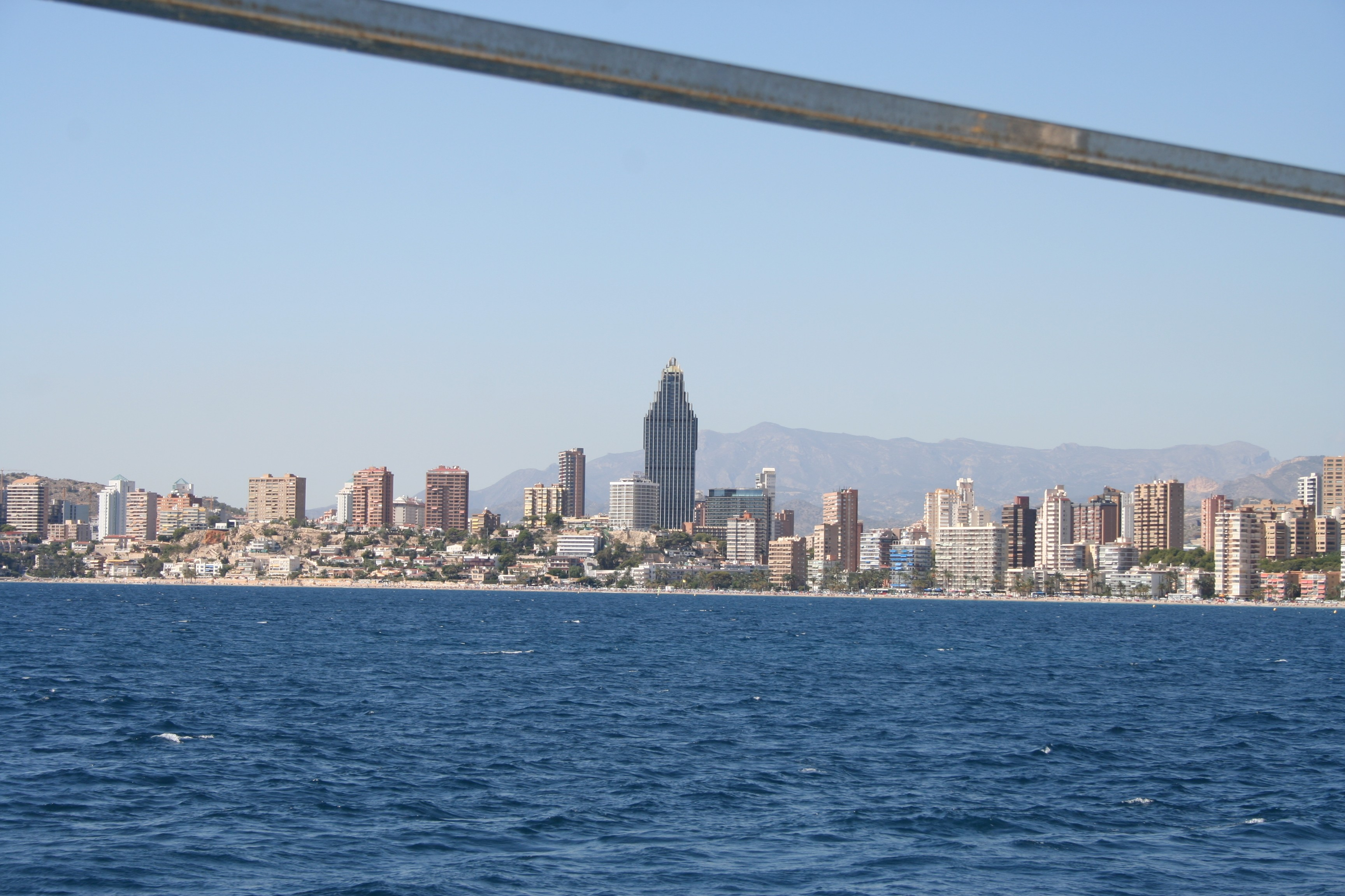 Vista de Benidorm desde el mar, en Alicante (España)